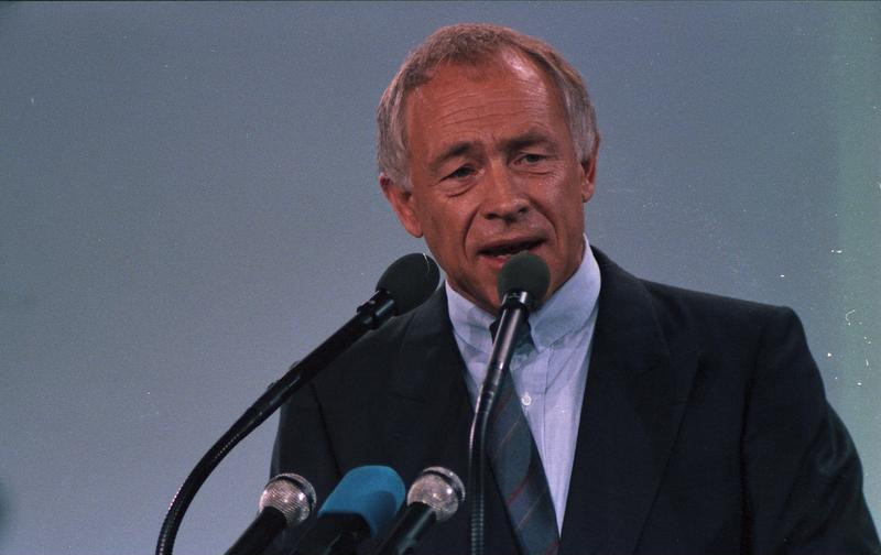 34. Bundesparteitag der CDU in der Rheingoldhalle, Mainz (6.-8.10.1986) 7.-8. Oktober 1986